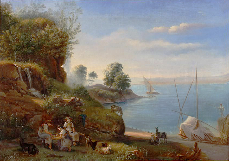 Paysage Du Lac Léman à Genève